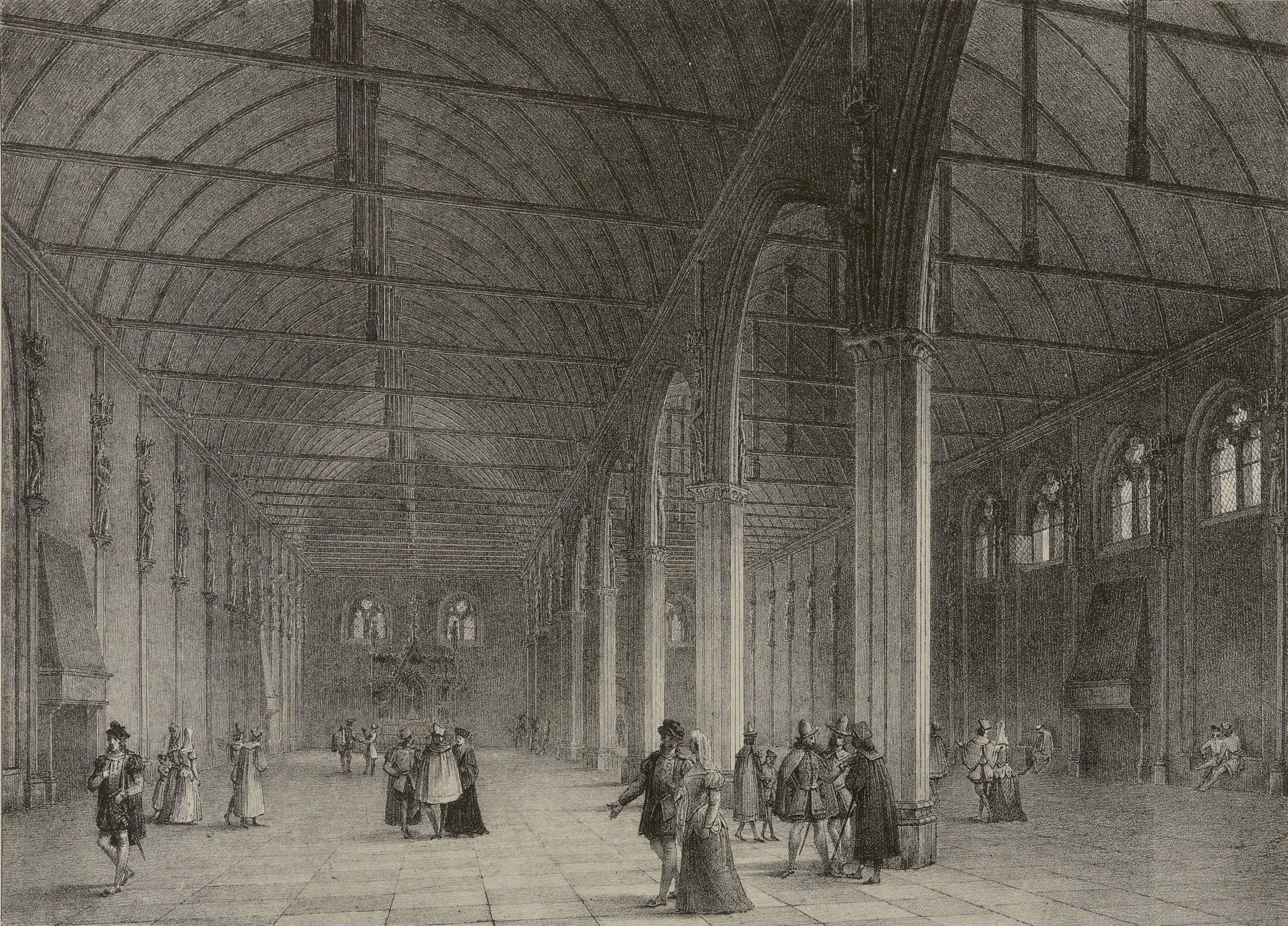 Palais de Justice. Ancienne grand'Salle incendiée en 1618.